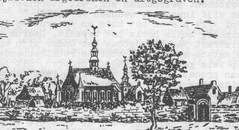 Noordgouwe_Karthuizerklooster/Driekoningenkerk